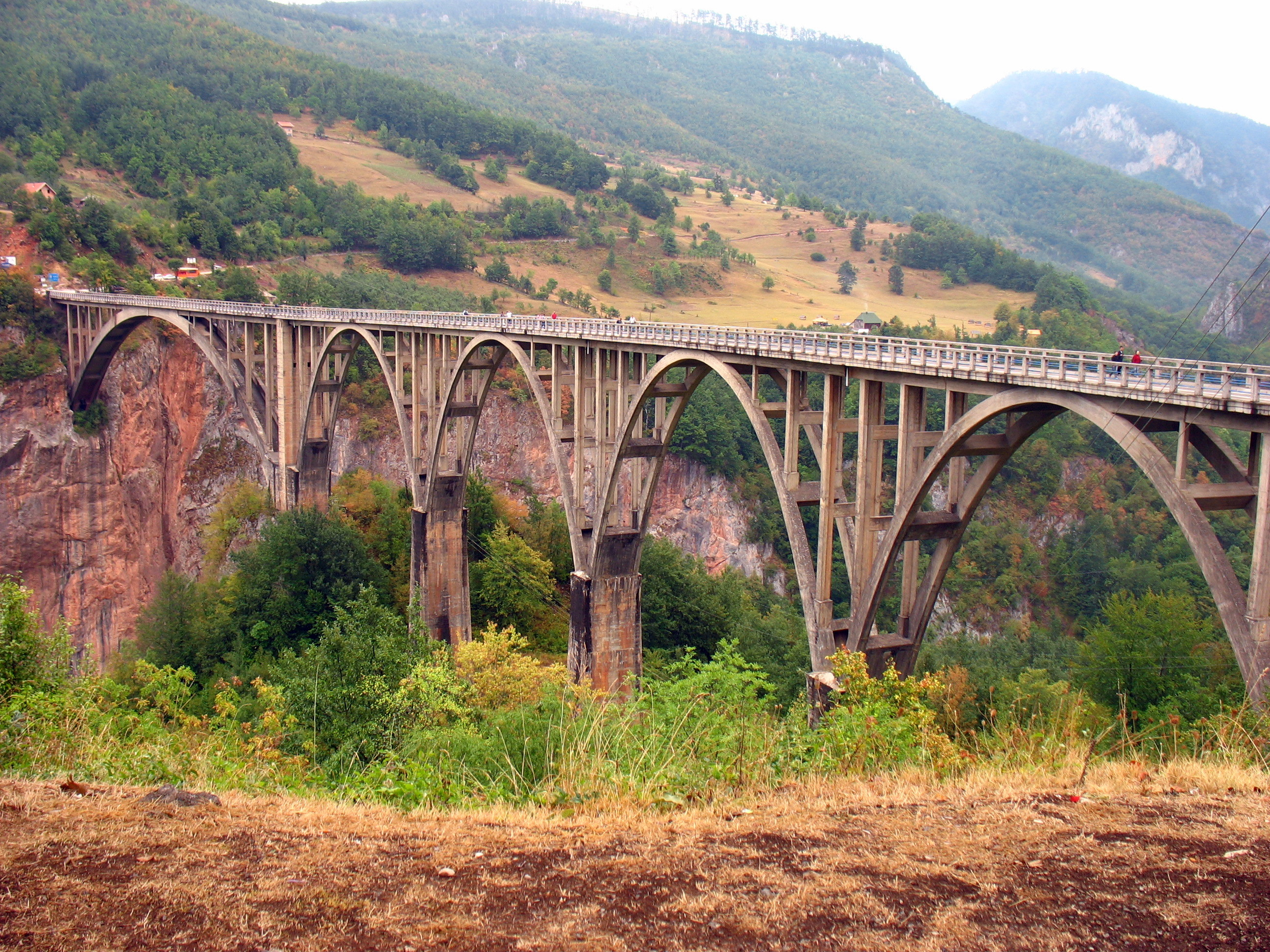 Đurđevića Tara Bridge